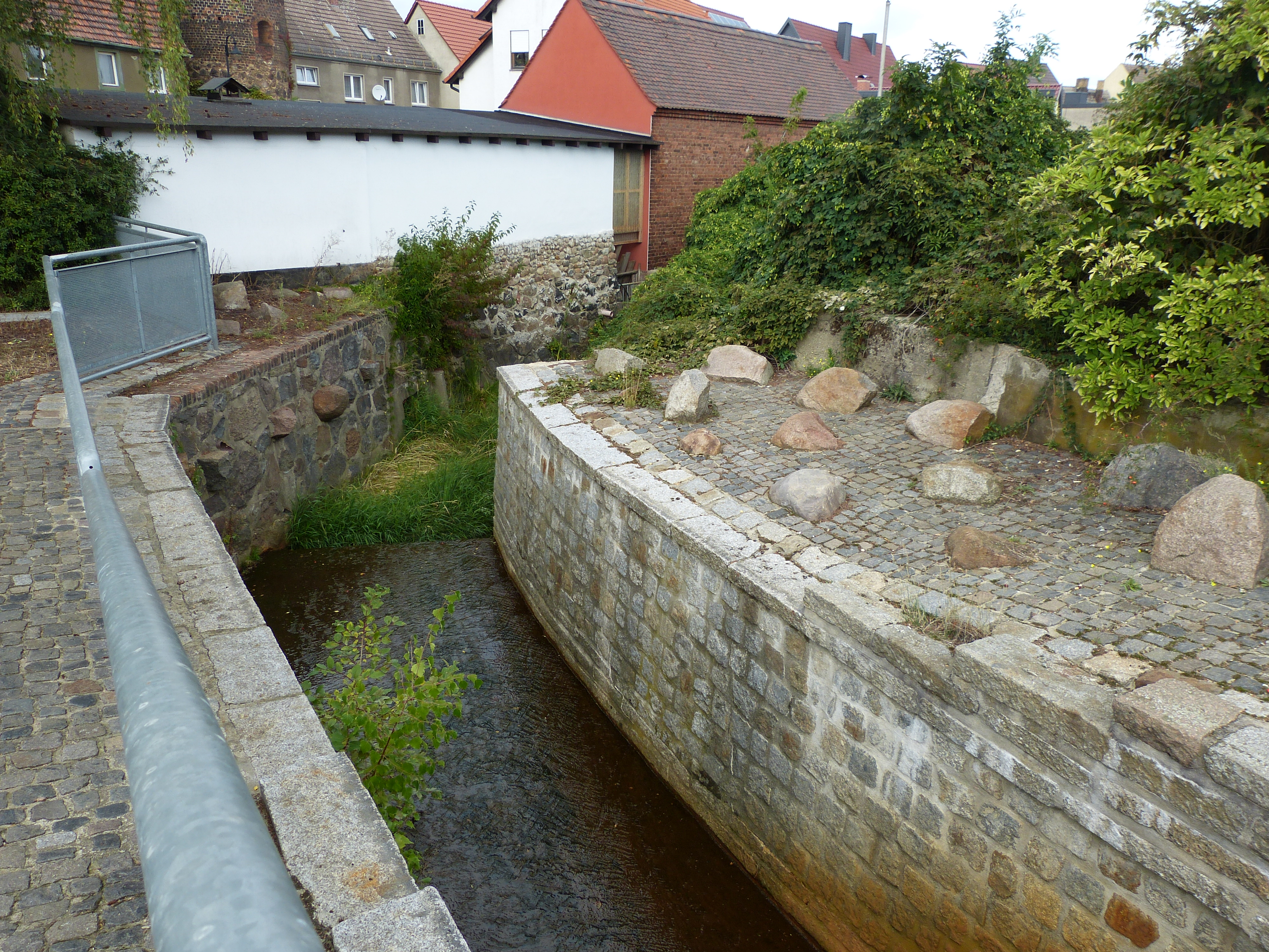 Bild am Geländer des Mühlengrabens mit Erläuterungen betreffs eines Müllers.